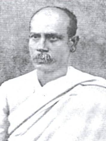 পুলিন বিহারী দাশ, ভারতীয় স্বাধীনতা সংগ্রামী